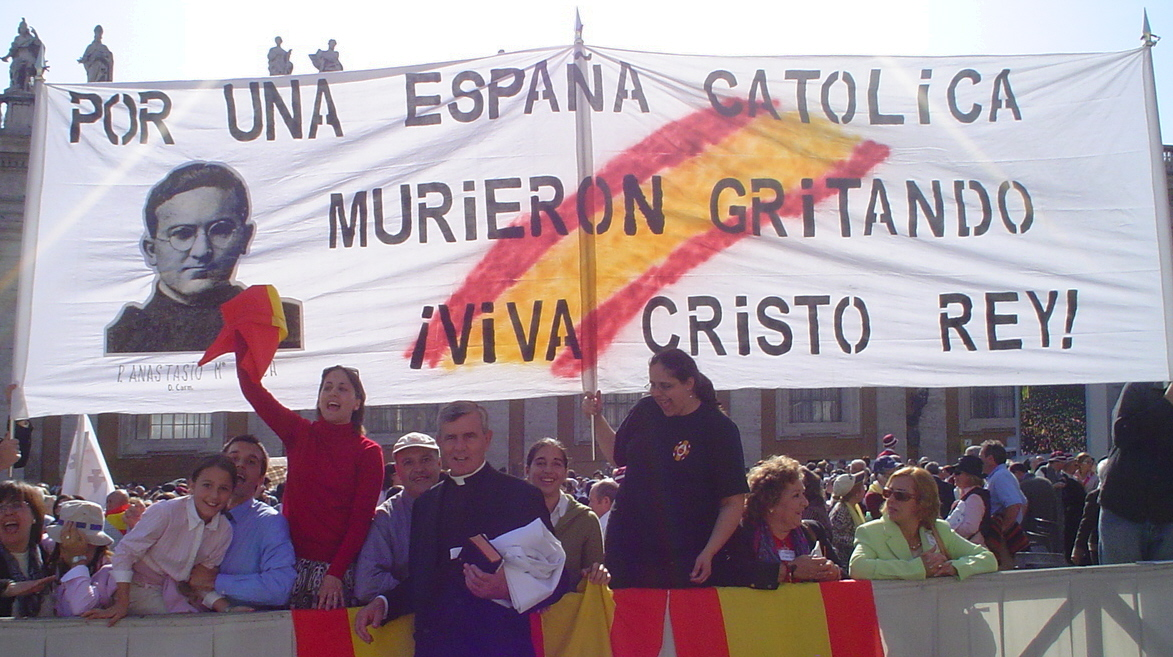 Ceremonia Beatificación Mártires españoles del siglo XX, Roma, octubre 2007